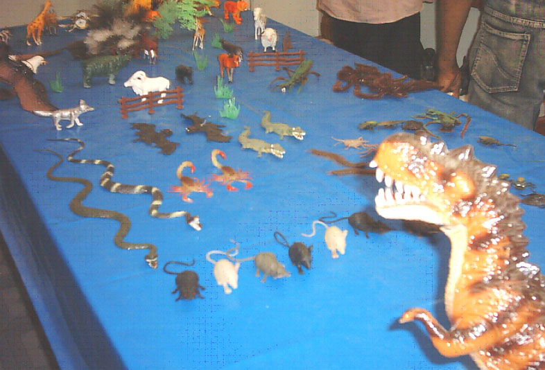 نماذج لبعض الزواحف والديناصورات (منتج الصورة Eng_momo86)